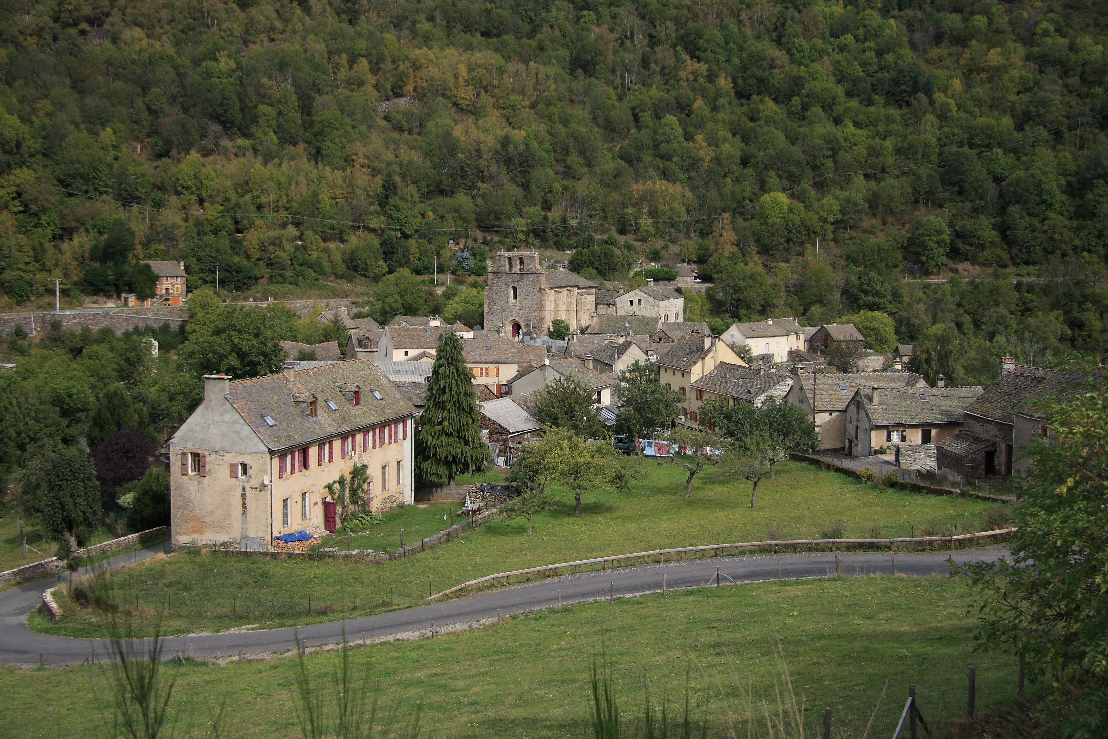 Saint-Julien-du-Tournel